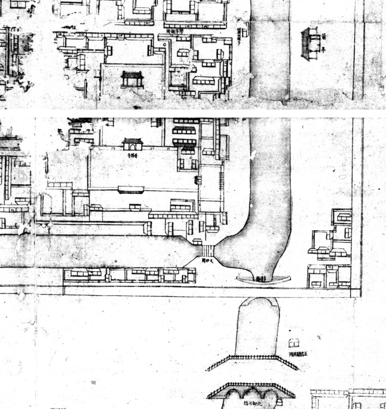 乾隆十五年（1750年）完成的《乾隆京城全图》中的普胜寺及其附近地区。本图来自清內務府藏京城全圖，故宮博物院影印，民國二十九年十二月（1940年）。普胜寺南、北两部分原在该图的不同页，故本图为本人拼接而成，拼接时难免有差错，请自行查阅原图校对。